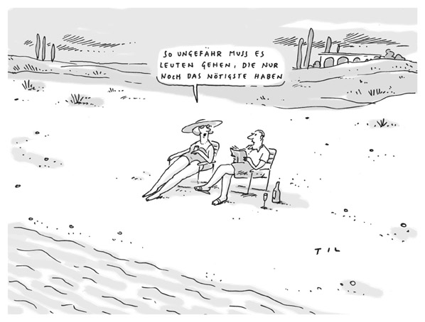 Zeichnung